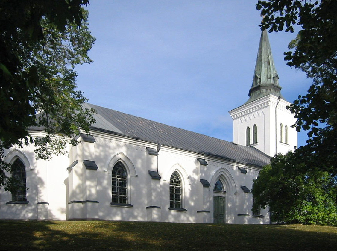 Östra Tollstad.